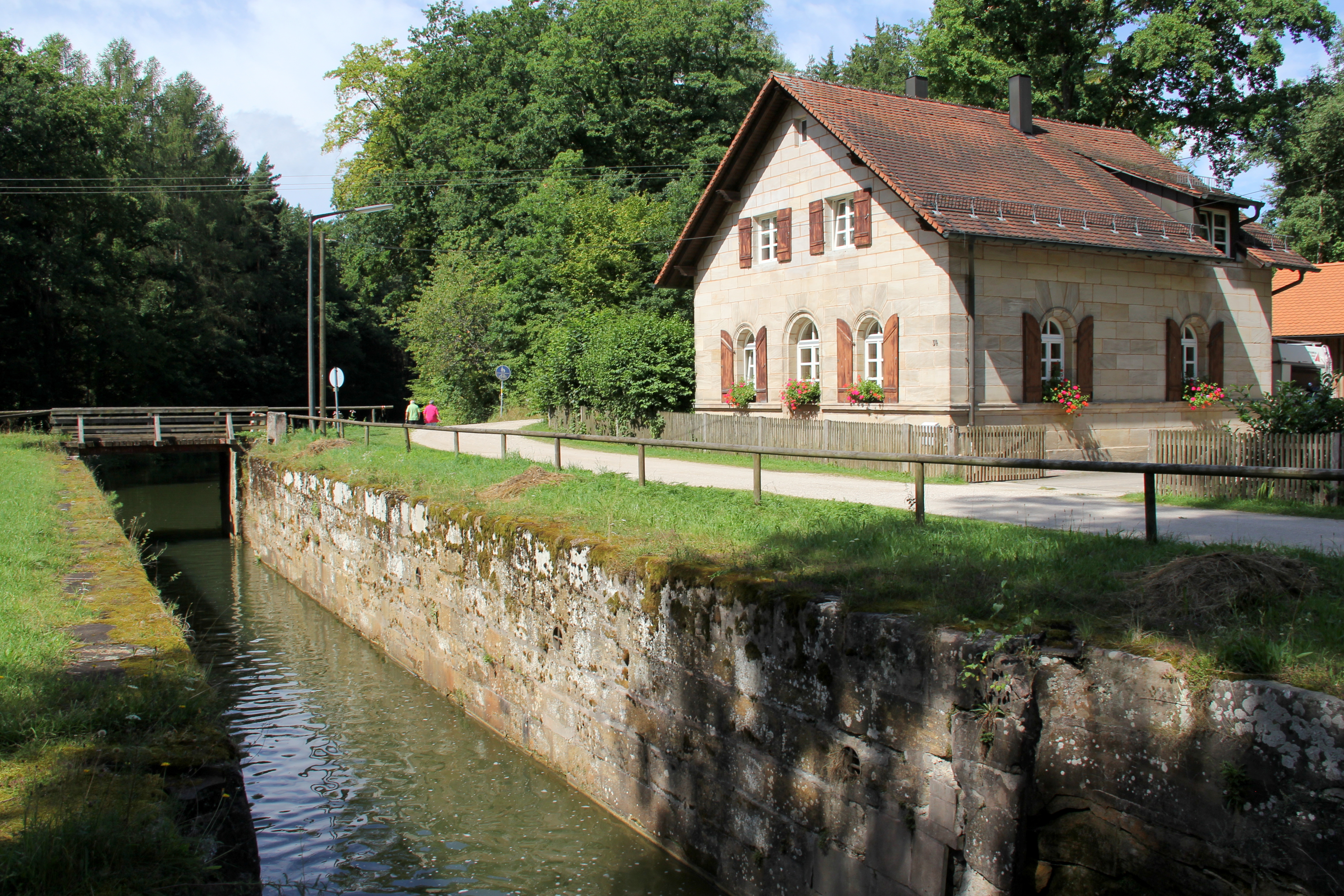 Schleuse 34